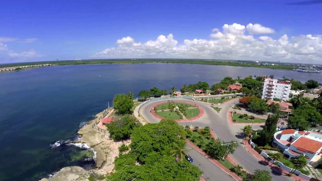 Rotonda del Malecón de SPM